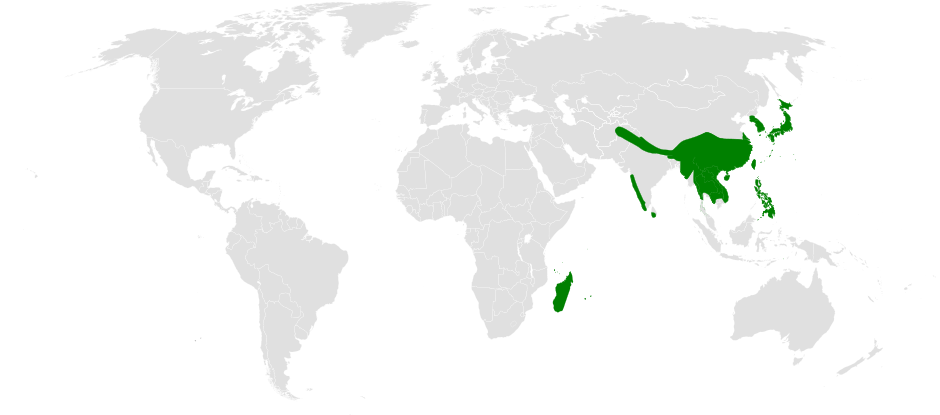 Hypsipetes distribution map, as the genus is defined in Hungarian Wikipedia.